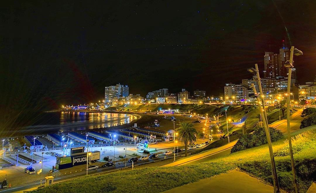 Bahia ex playa de los ingleses